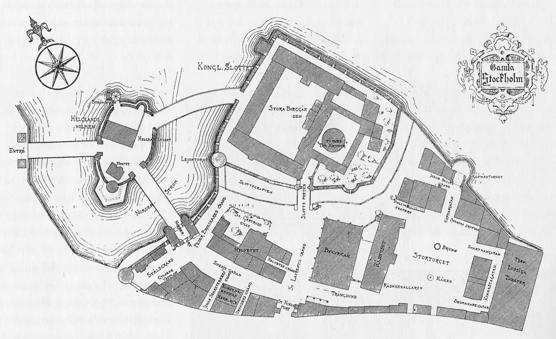 Plan till "Gamla Stockholm"